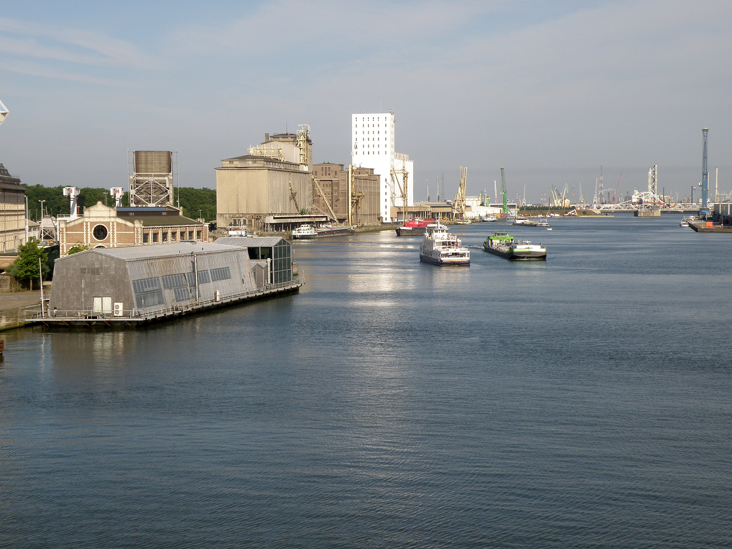 Antwerpen. Amerikadok.